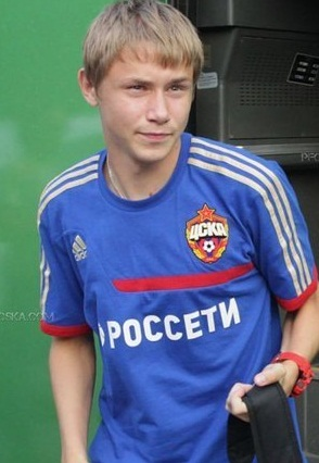 Полузащитник ПФК ЦСКА и молодежной сборной России Дмитрий Ефремов